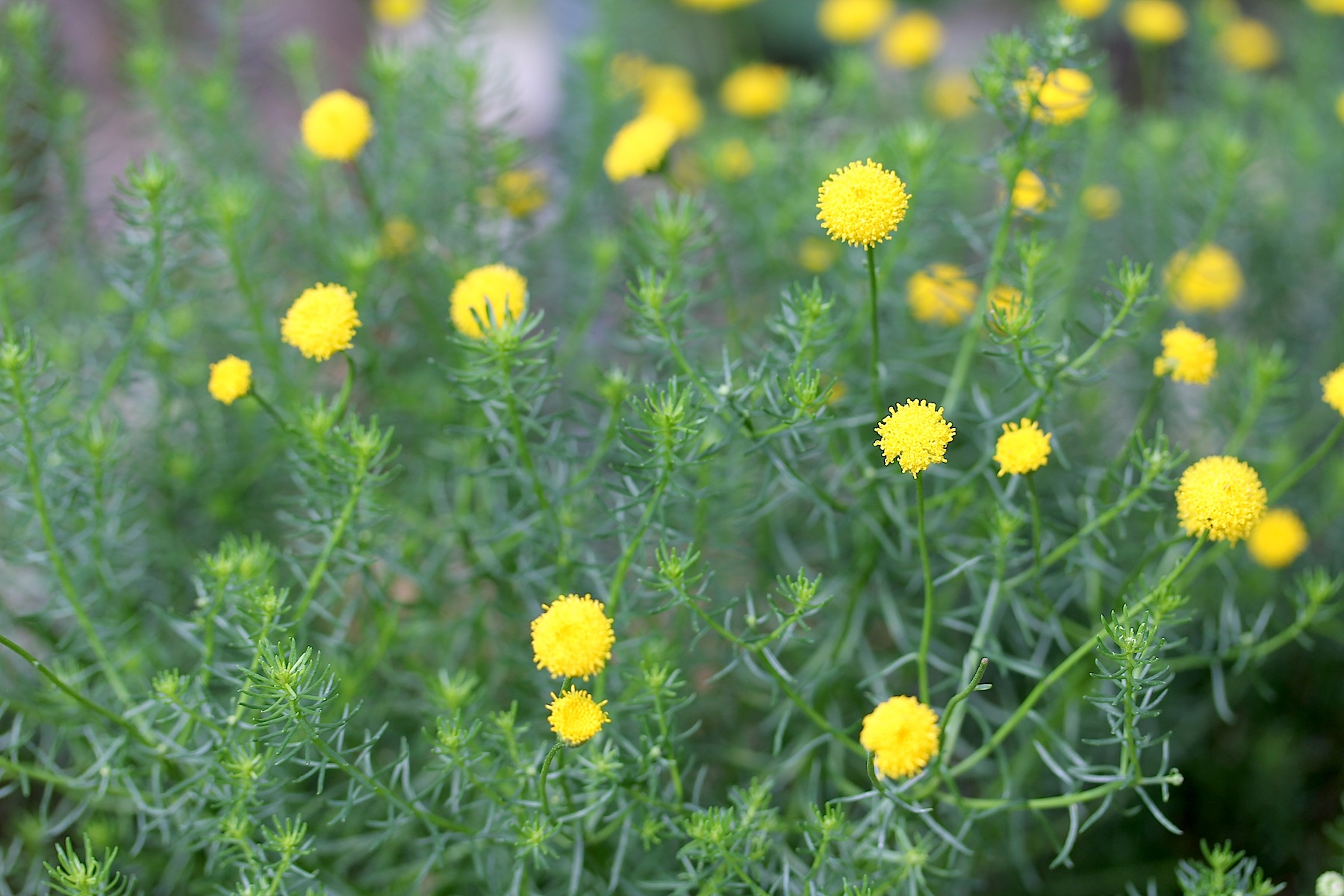 Chrysocoma coma-aurea